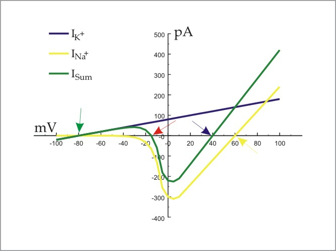 fonte: autor